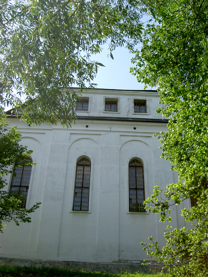 Tarnogród, Poland - Synagogue (now library), back view • Tarnogród, Polska - Synagoga (obecnie biblioteka), widok z tyłu